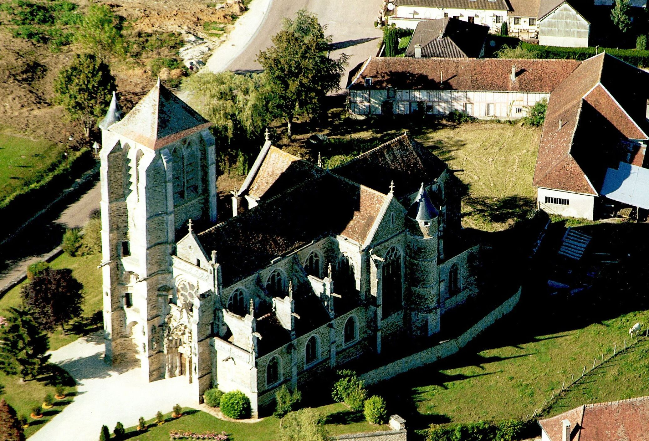 vue aérienne de l'église de Rumilly-les-Vaudes (10)